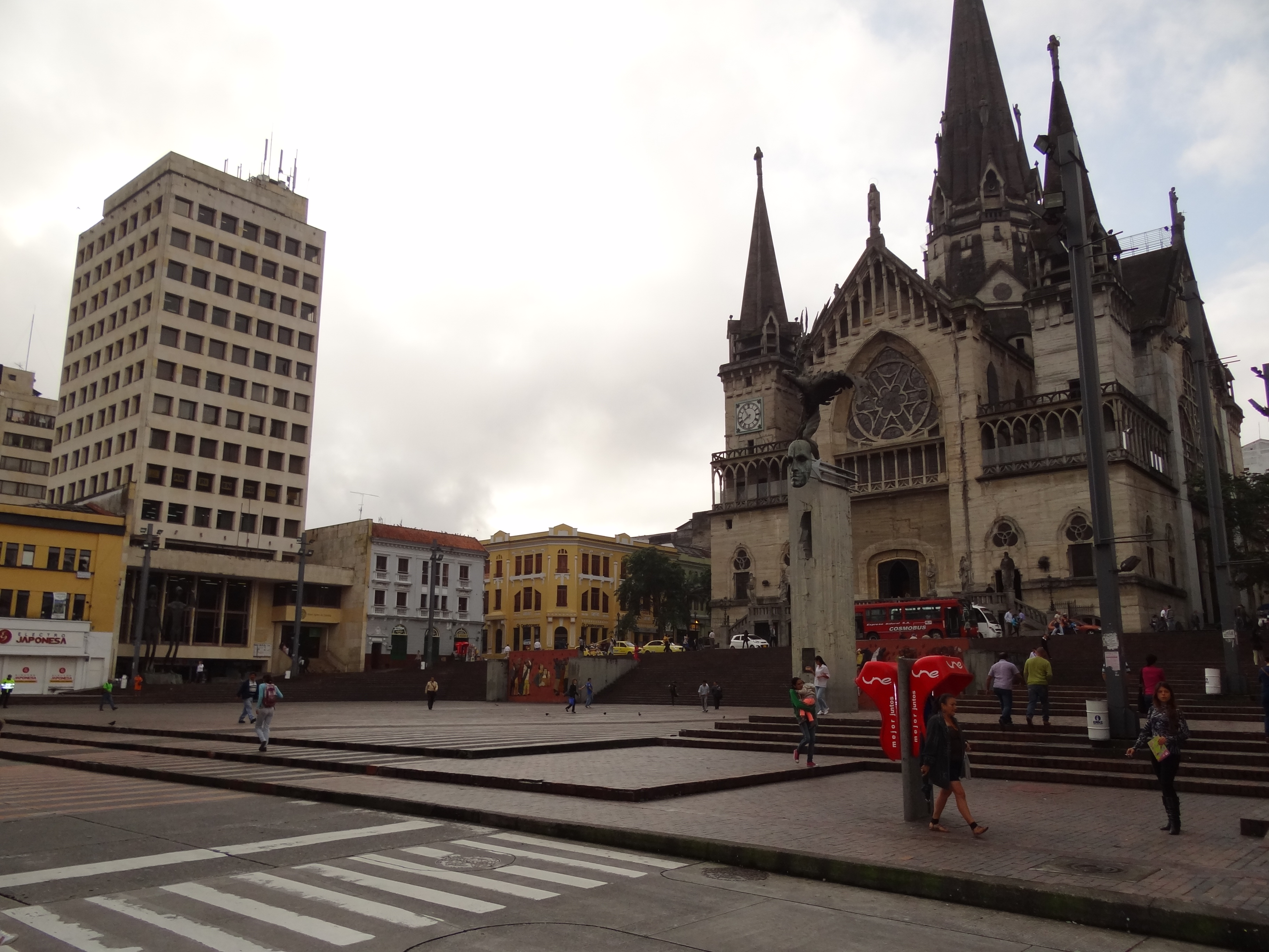 Parque principal, Manizales, departamento de Caldas, Colombia